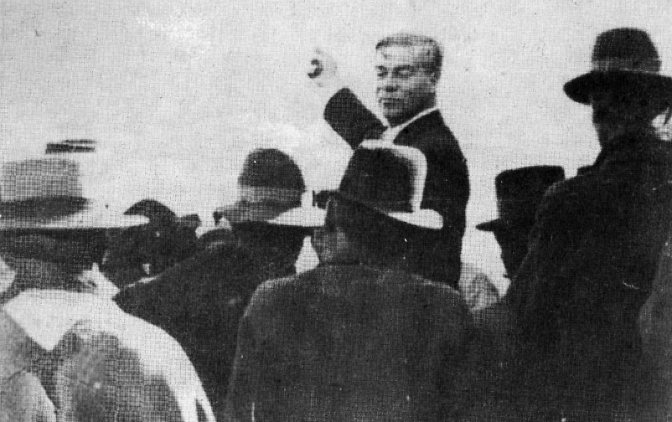 Luis Emilio Recabarren Serrano (Valparaíso, 6 de julio de 1876 - Santiago, 19 de diciembre de 1924) fue un destacado político Chileno de principios de siglo XX. Es considerado el padre del movimiento obrero chileno revolucionario izquierdista.